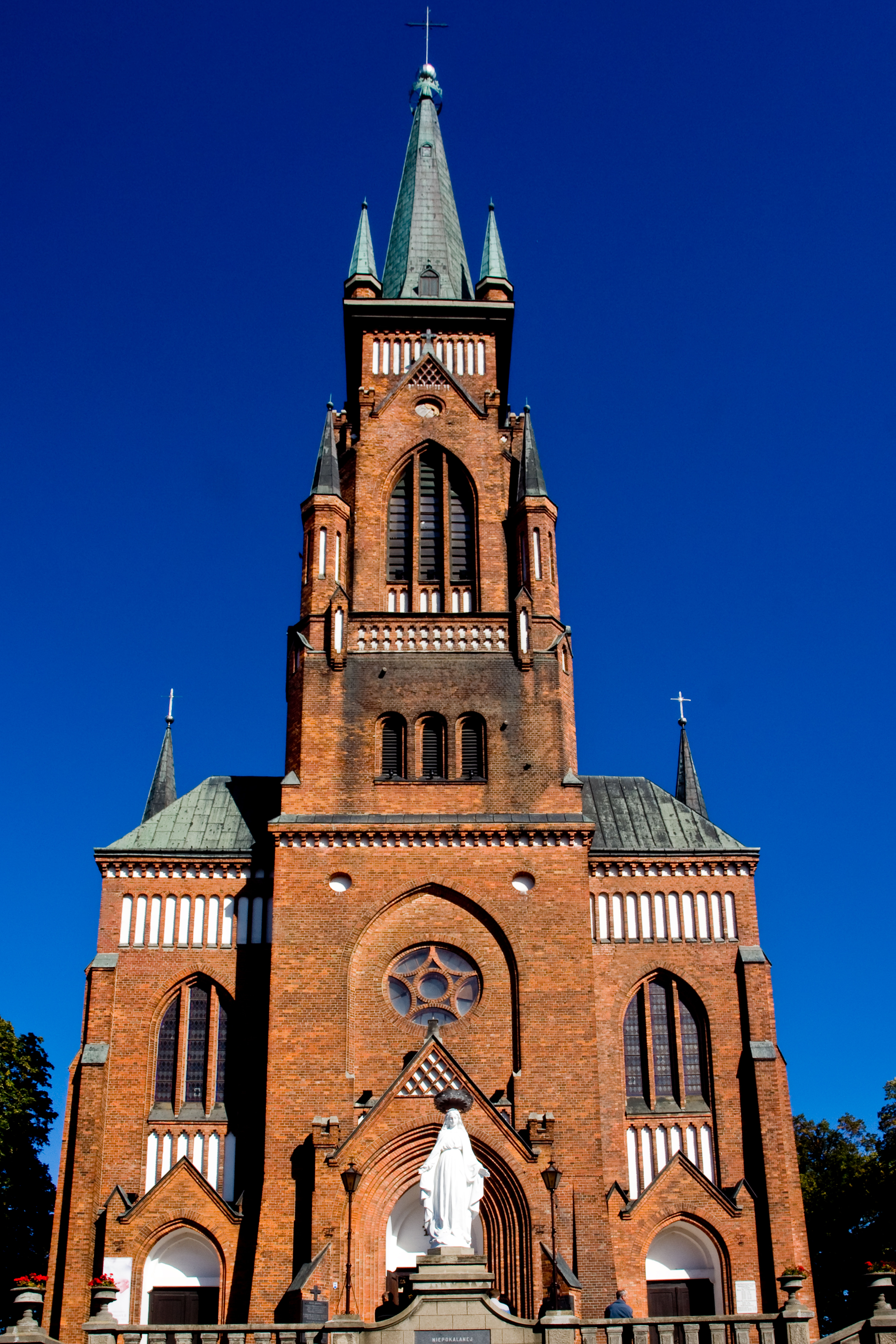 Pruszków Żbików, ul. 3 Maja 126 - kościół parafialny p.w. Niepokalanego Poczęcia NMP pocz. XX